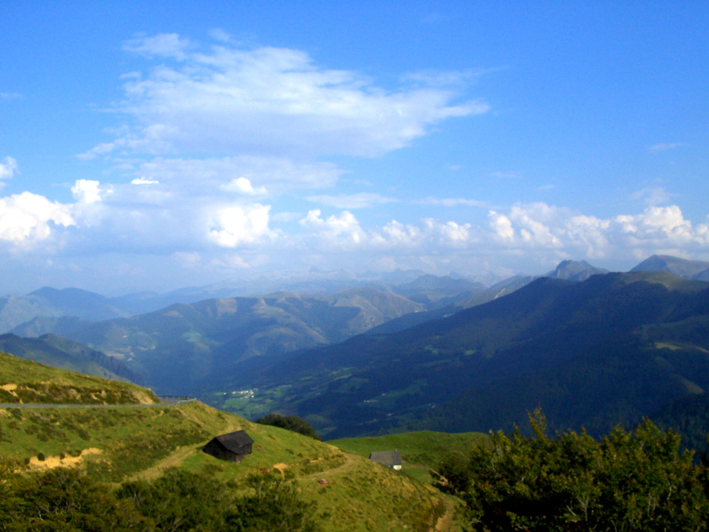 Vue de la forêt d'Iraty (Basse-Navarre/Soule)